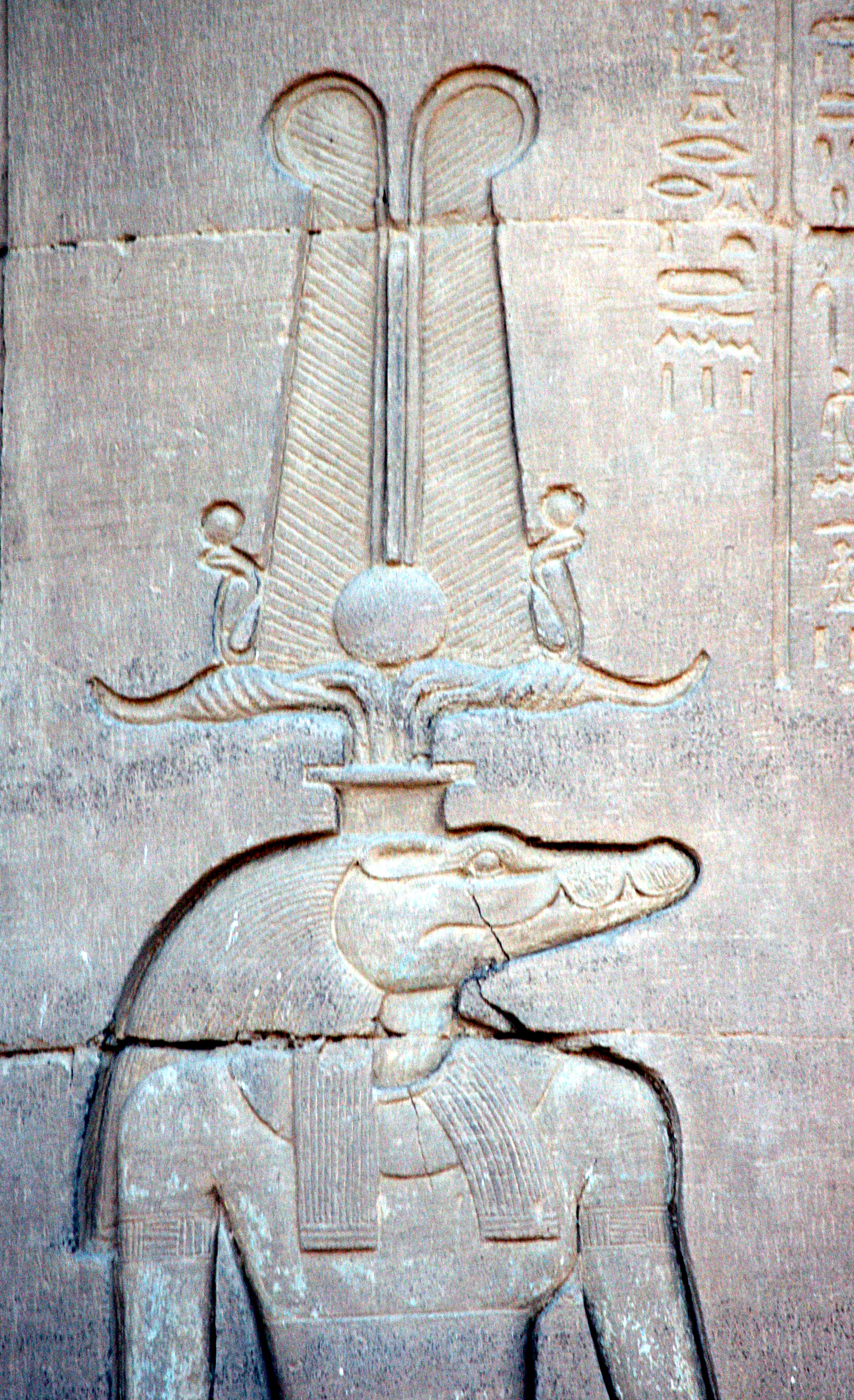 Tempel von Kom Ombo: Relief des Krokodilgottes Sobek